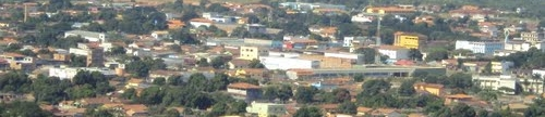 Centro de VZP